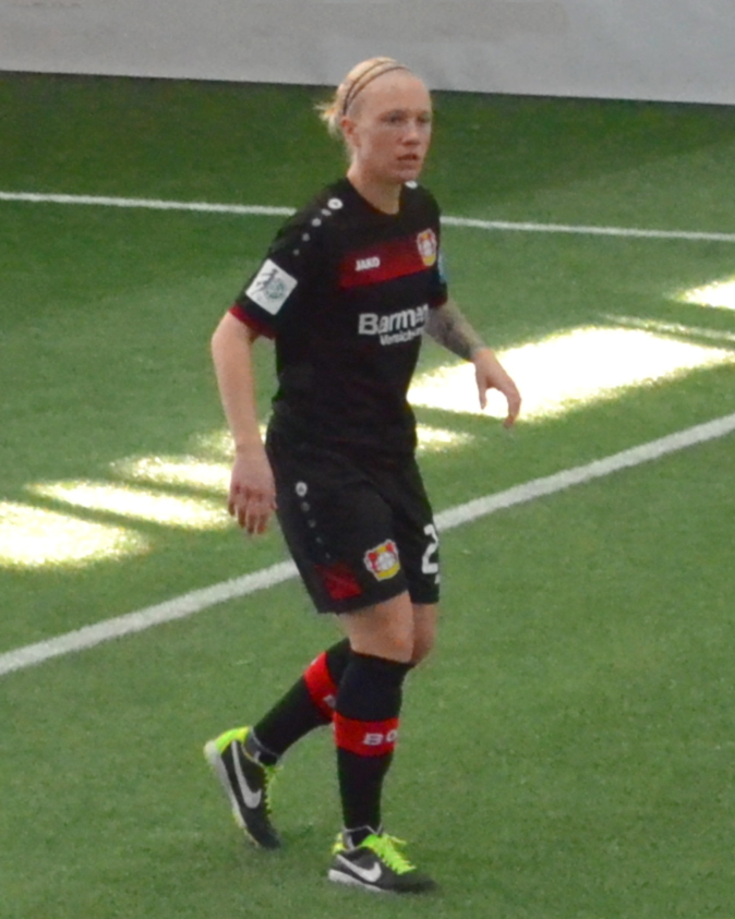 Jil Ludwig (Bayer Leverkusen) beim SAP Frauen-FußballCup 2017